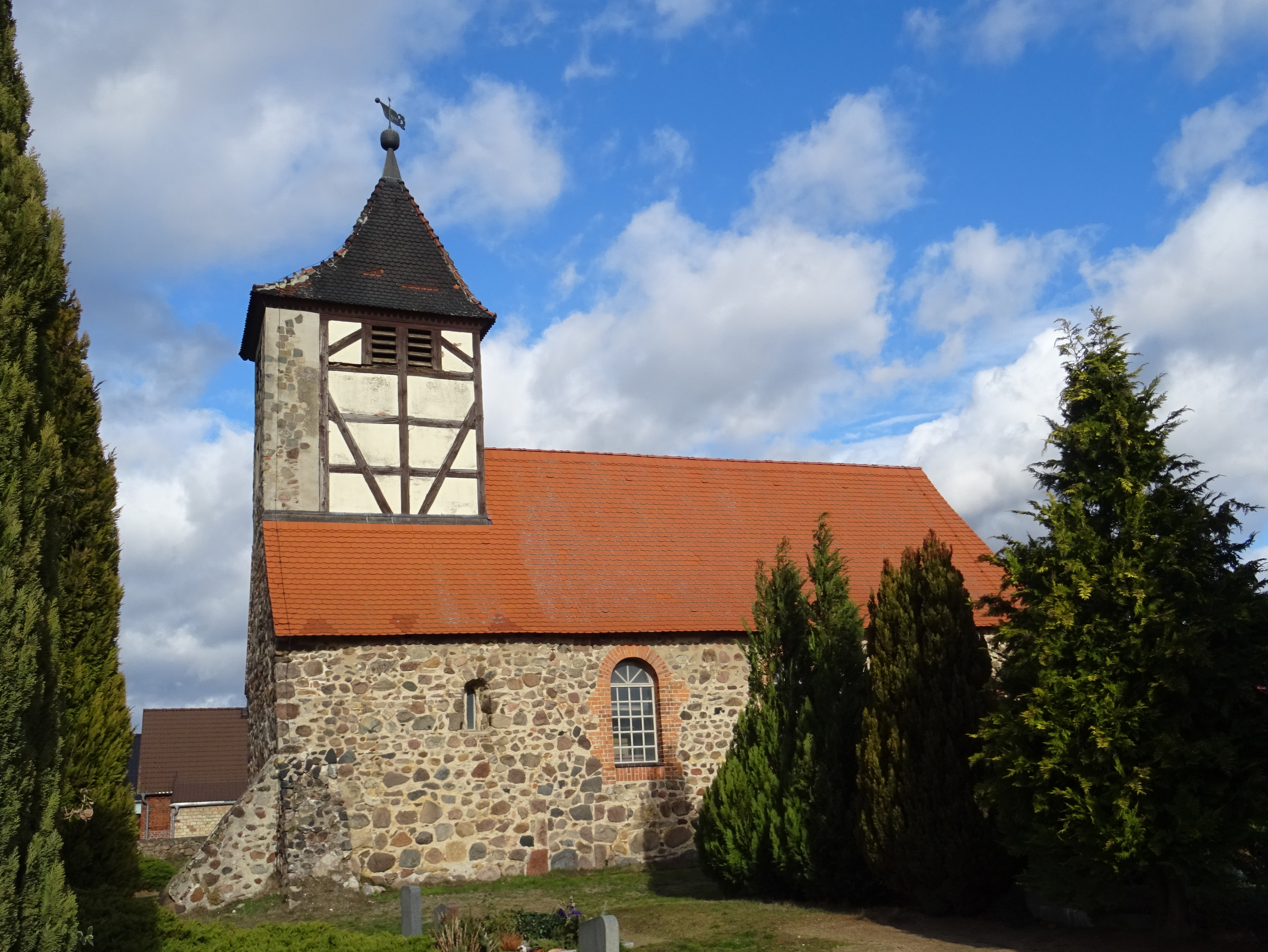 Denkmalgeschützte Dorfkirche in Wergzahna, Gemeinde Niedergörsdorf, Ansicht von Süden